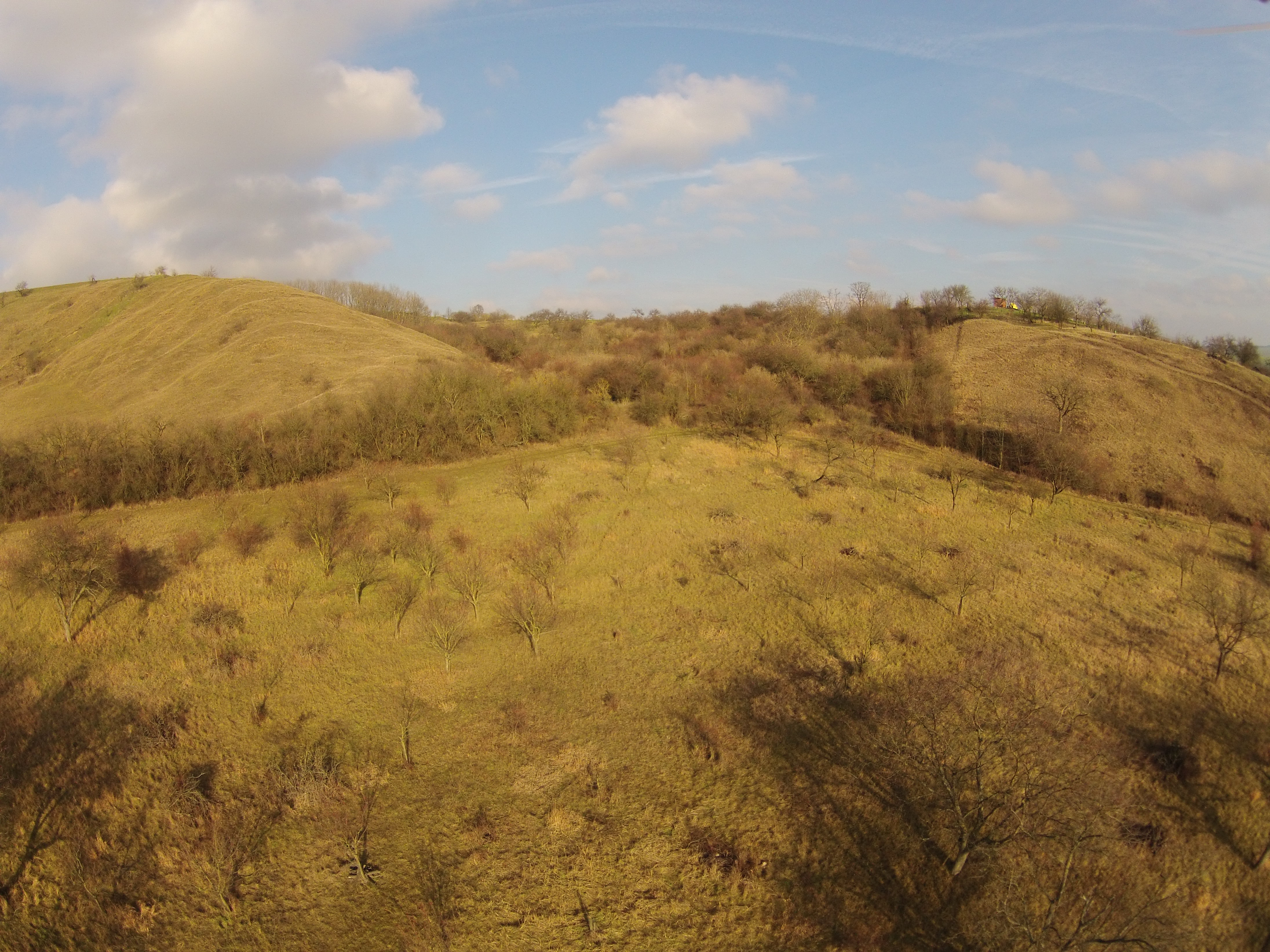 Přírodní památka Člupy.